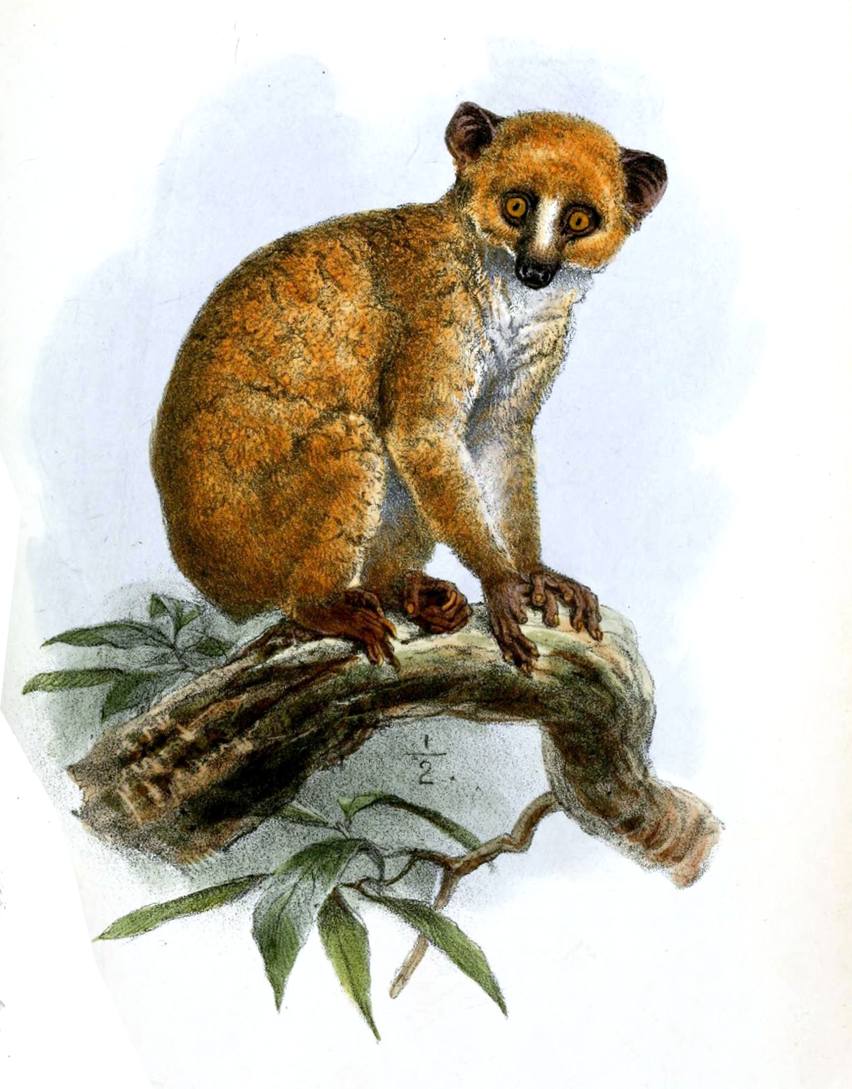 Arctocebus calabarensis